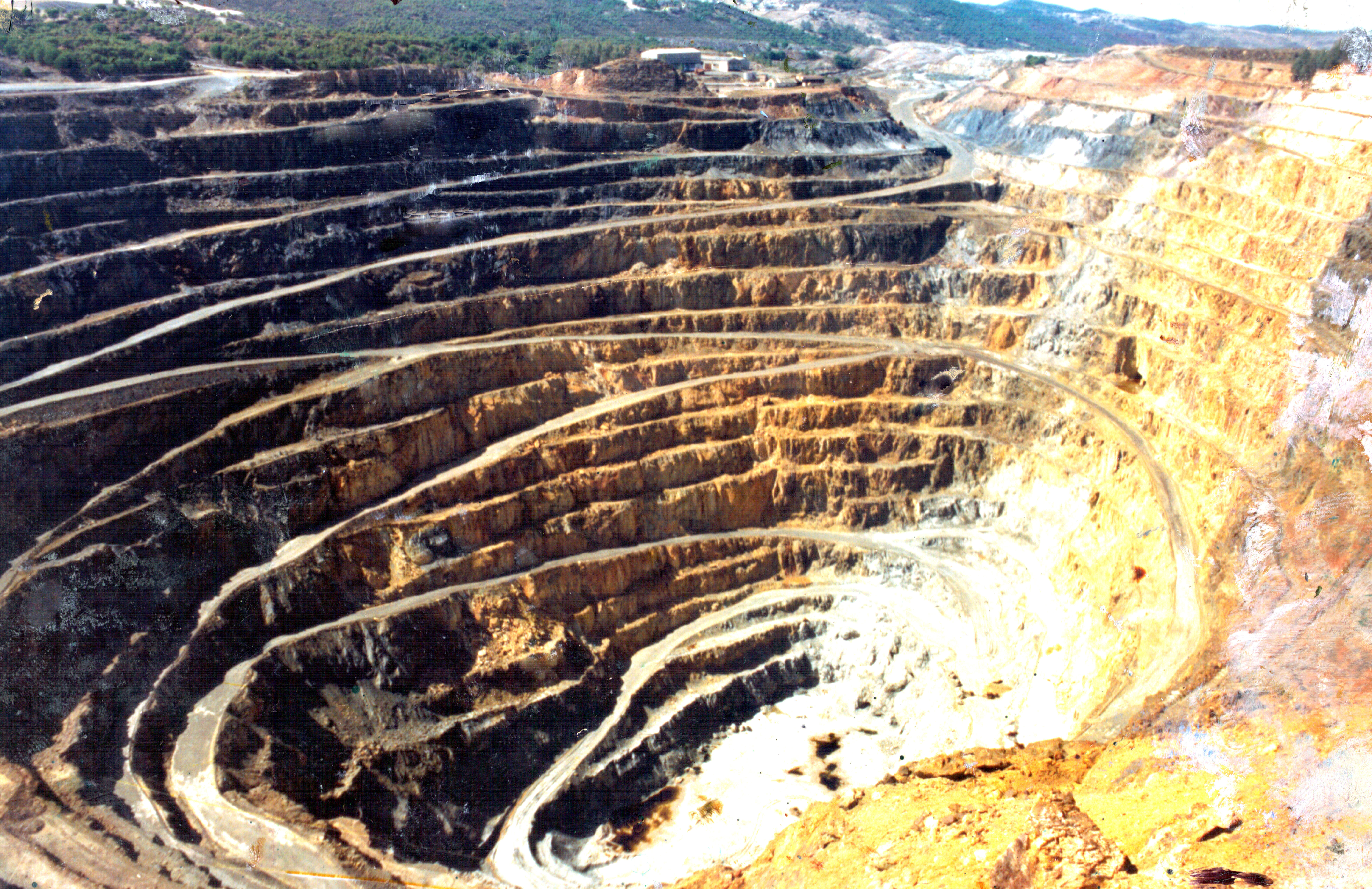 Foto antigua de Corta Atalaya.